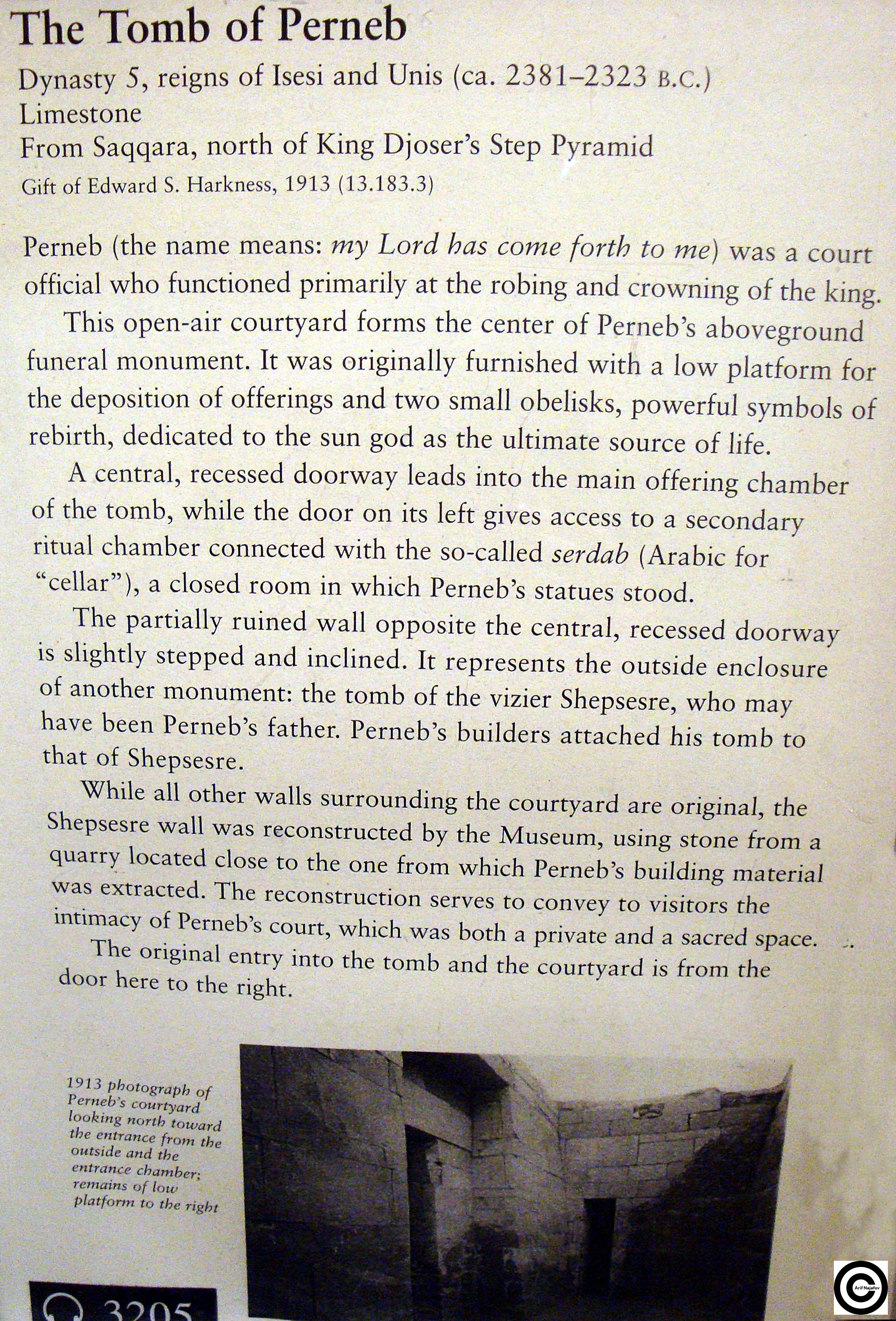 Perneb türbəsi, Metropoliten muzeyi, Nyu York